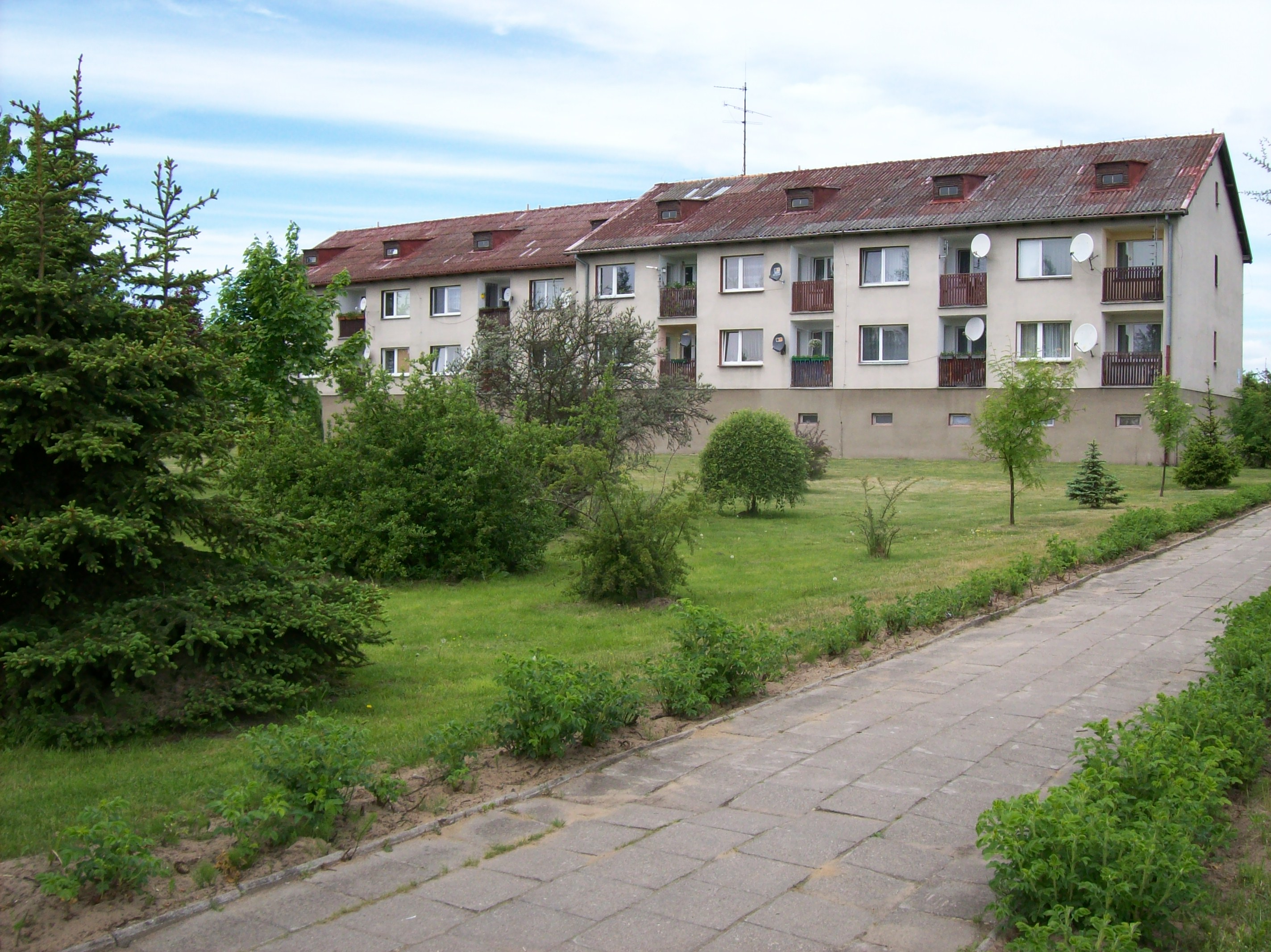 Budynki mieszkalne w Krzyżu Wlkp.